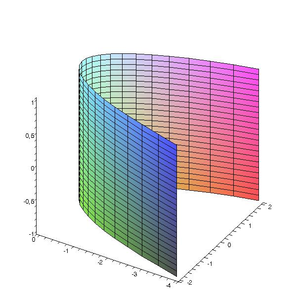 Graphe 3D cylindre paraboloïque, créé avec Maple 9